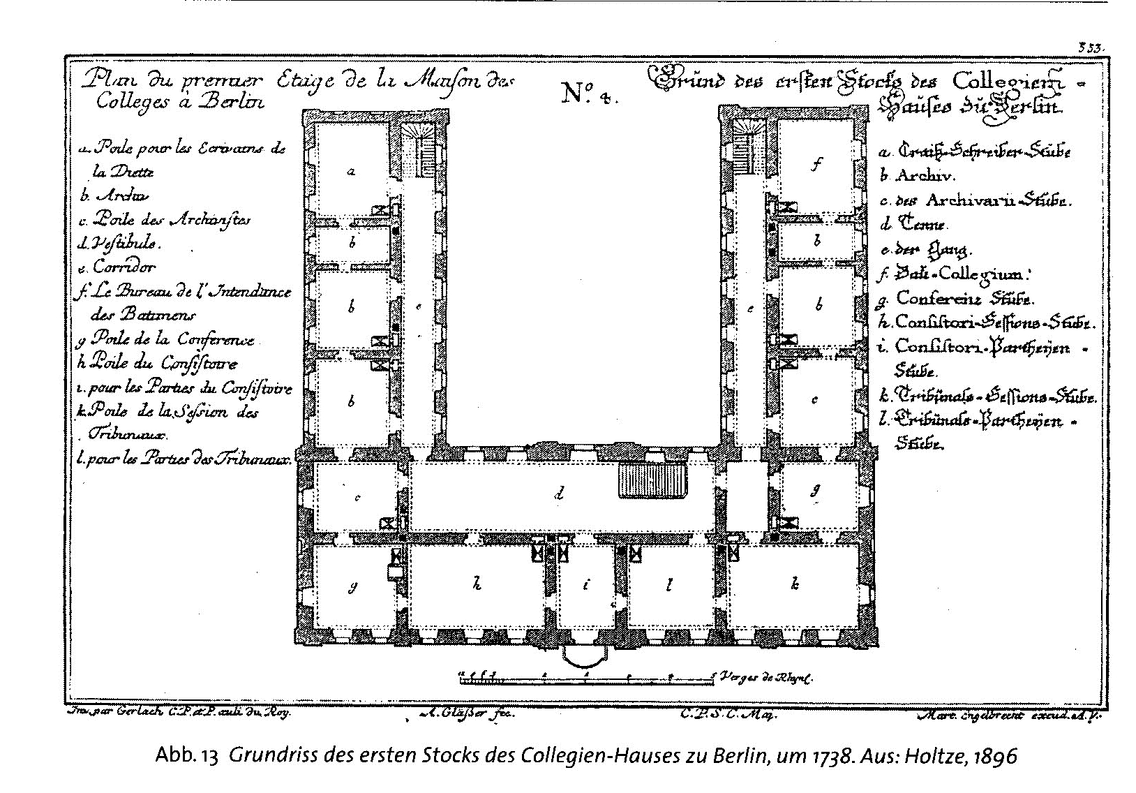 Kollegienhaus Berlin Plan du premier Etage de la Maison des Colleges à Berlin. / Grund des ersten Stocks des Collegien-Hauses zu Berlin.